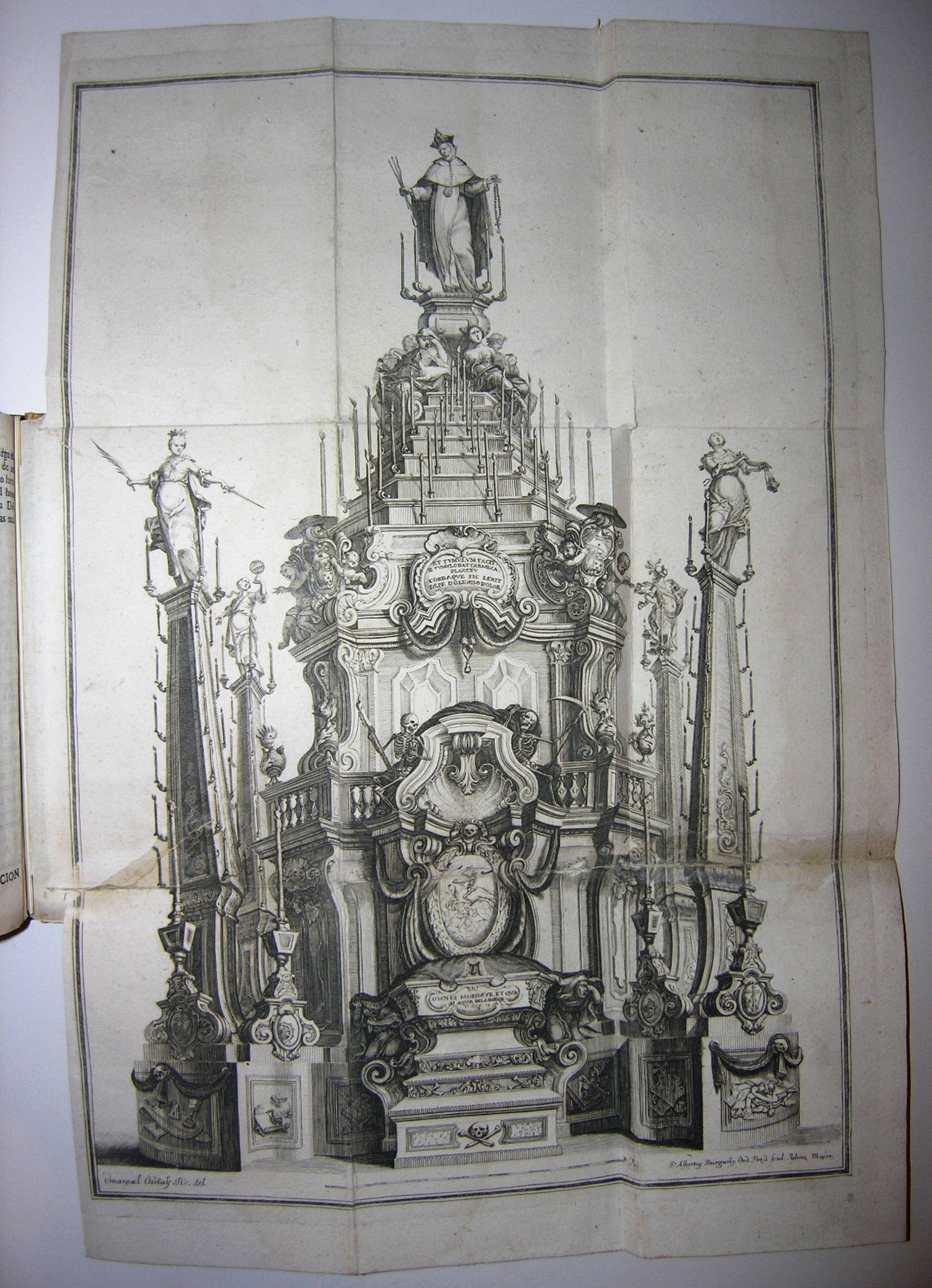 Túmulo alzado en el convento de Santa Catalina de Barcelona para las solemnes exequias en la muerte de fray Tomás Ripoll, Maestro General de la Orden de Santo Domingo. Grabado de Albert Burguny por dibujo de Manel Vinyals, hoja plegada de la "Breve y descriptiva relación de las solemnes exequias, que la religiosa comunidad del convento de Santa Cathalina virgen, y mártyr de Barcelona, consegró a la venerable memoria del mas Ilustre Hijo, y amado Padre el Reverendissimo Fr. Thomas Ripoll.", en Barcelona, 1748